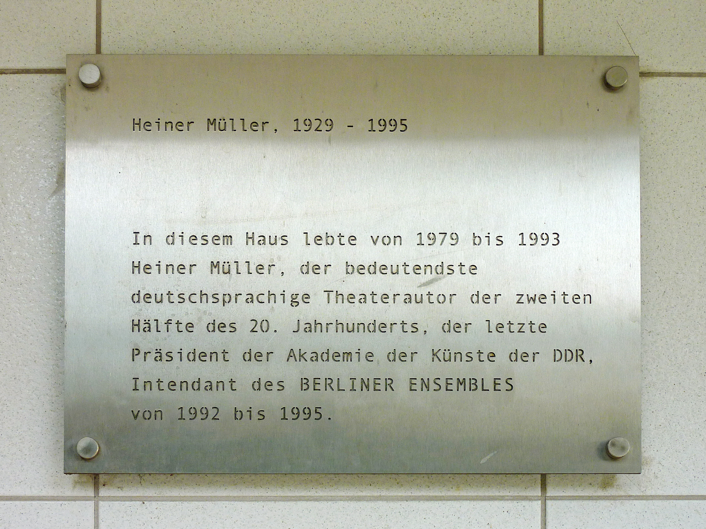 Gedenktafel aus Edelstahlblech für Heiner Müller († 1995) am Eingang seines Wohnhochhauses in der Erich-Kurz-Straße 9 in Berlin-Friedrichsfelde. Enthüllt am 9. Januar 2004, seinem 75. Geburtstag. [1]